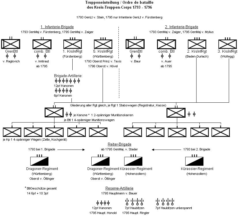 Truppeneinteilung / Ordre de bataille des Corps der Schwäbischen Kreistruppem 1793 bis 1796